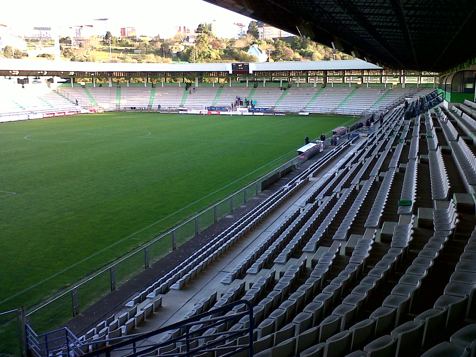 Estadio Municipal da Malata (Ferrol).